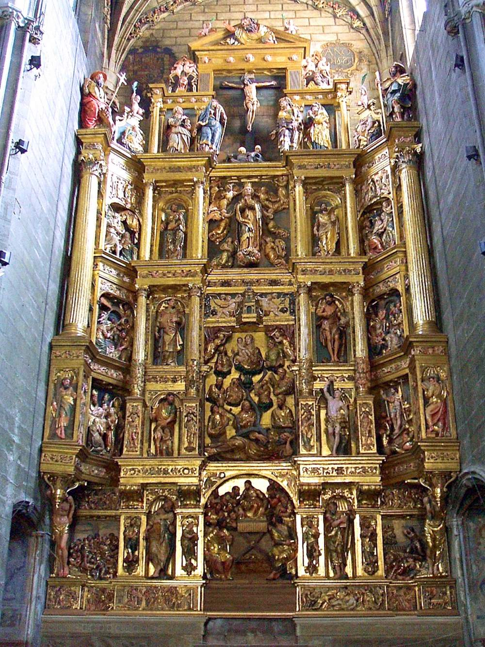 Iglesia de Santa María del Palacio, Logroño (La Rioja). Retablo mayor